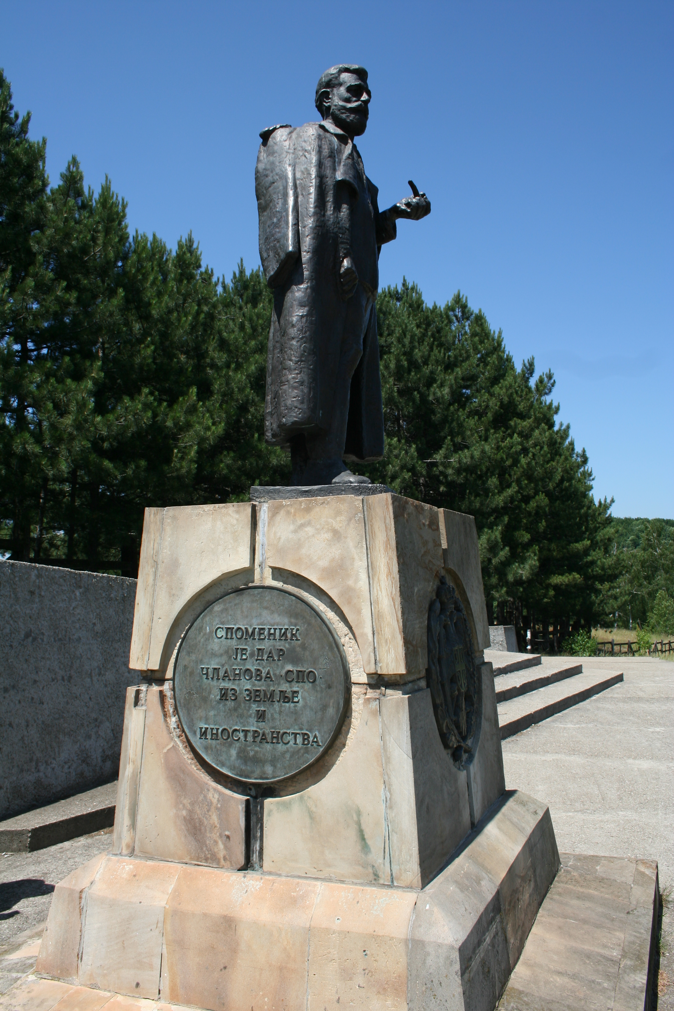 Spomen kompleks Ravna Gora